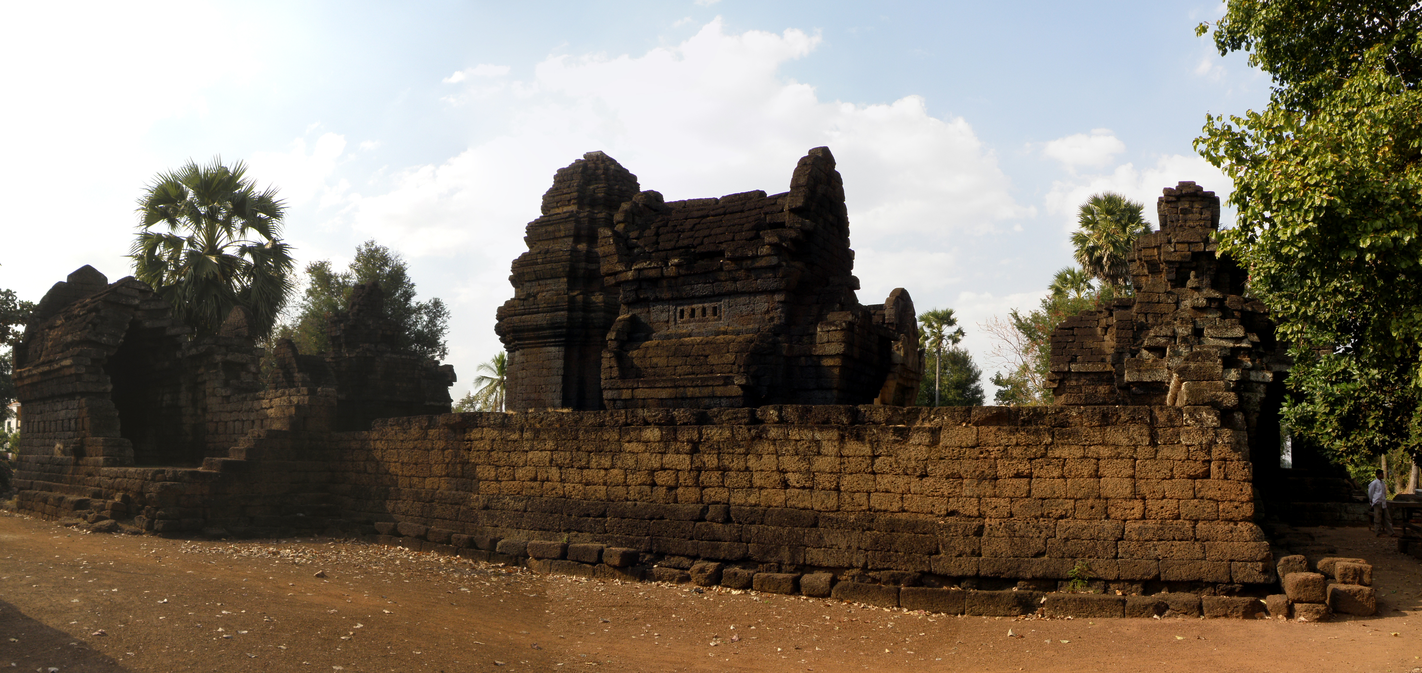 Cambodge - Le Vat Nokor à Kampong Cham